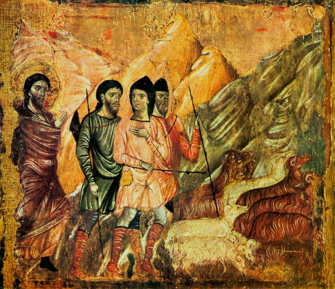 Мадонна_с_младенцем_на_троне,_деталь